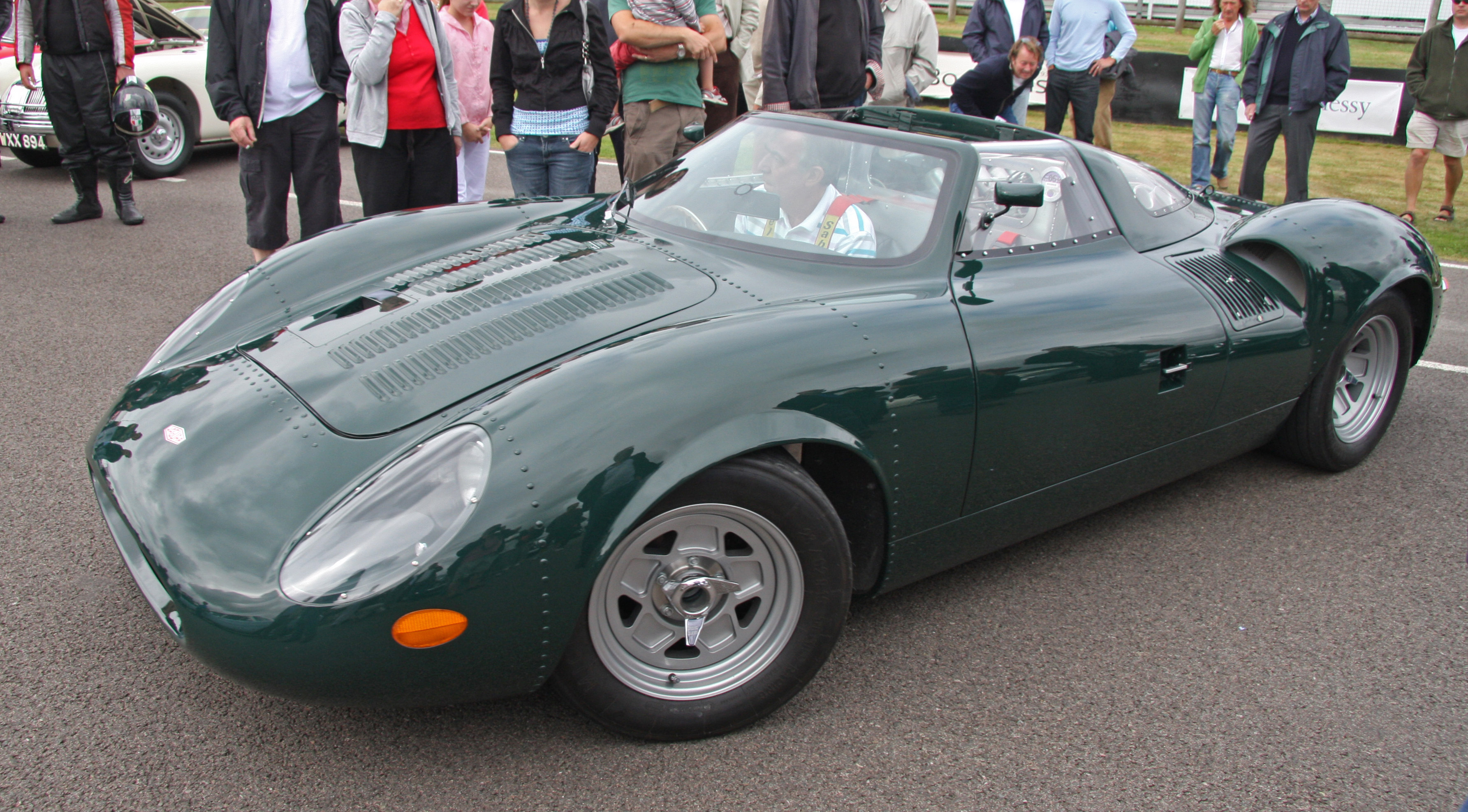 Replica apparently